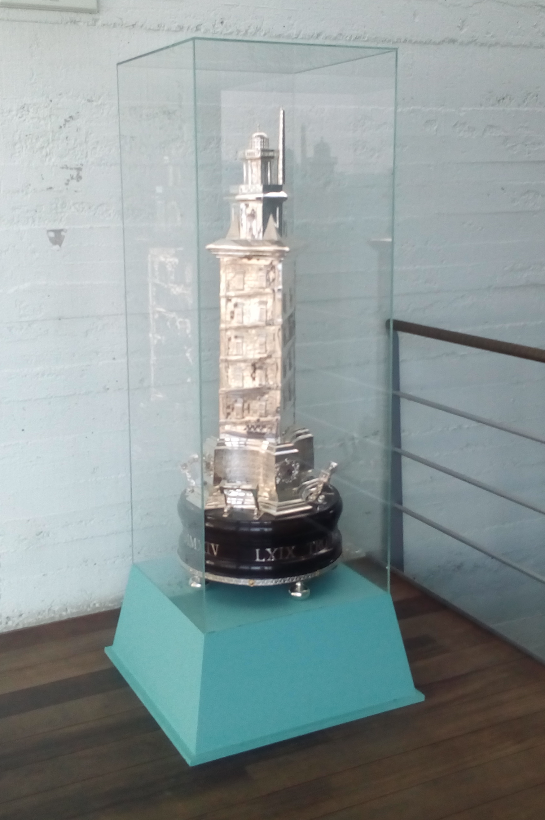 trofeo teresa herrera en el Museo del Mar de Galicia de Vigo